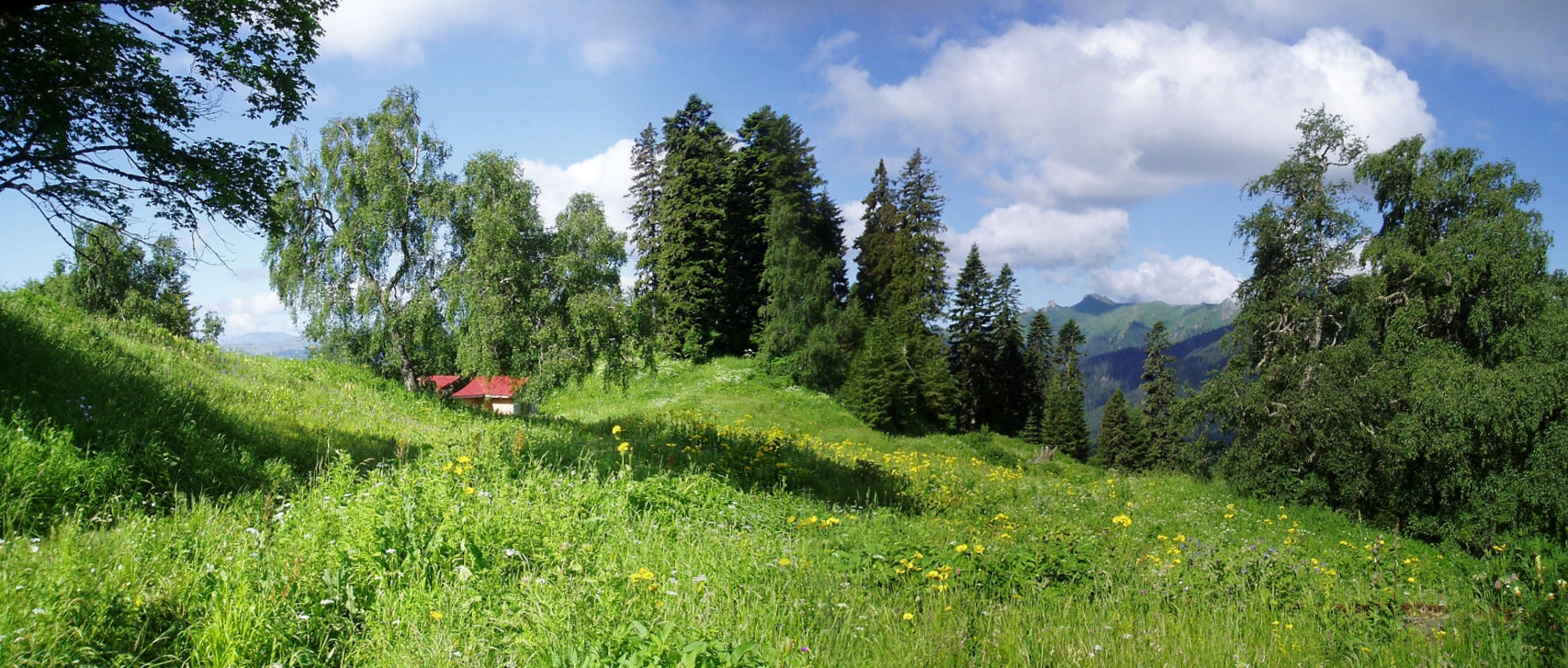 Abastumani